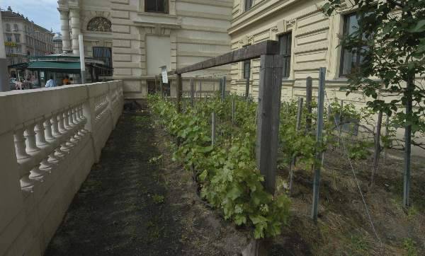 Weingarten am Schwarzenbergplatz